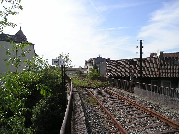 Le pont-frontière sur la ligne du Tonkin, à Saint-Gingolph.